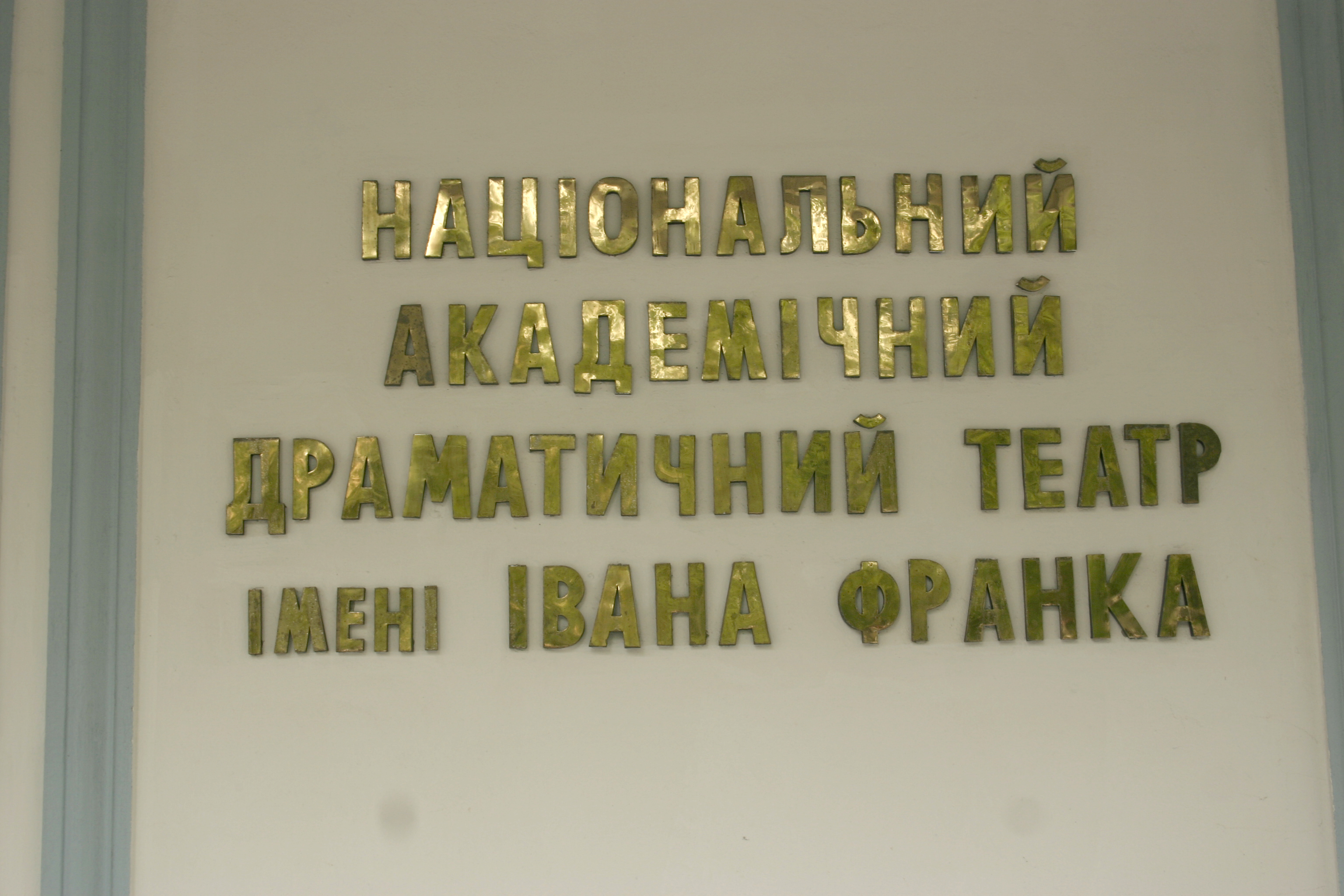 Табличка